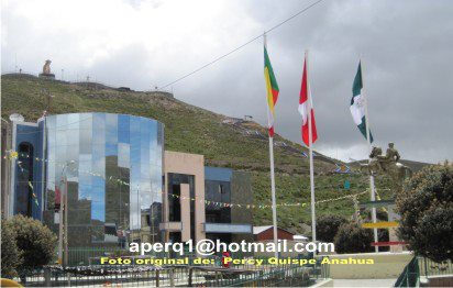 foto actual de la Plaza de San Martin del distrito de Antauta, Provincia de Melgar, Region Puno, fotografia tomada el Prof. Percy Quispe Anahua